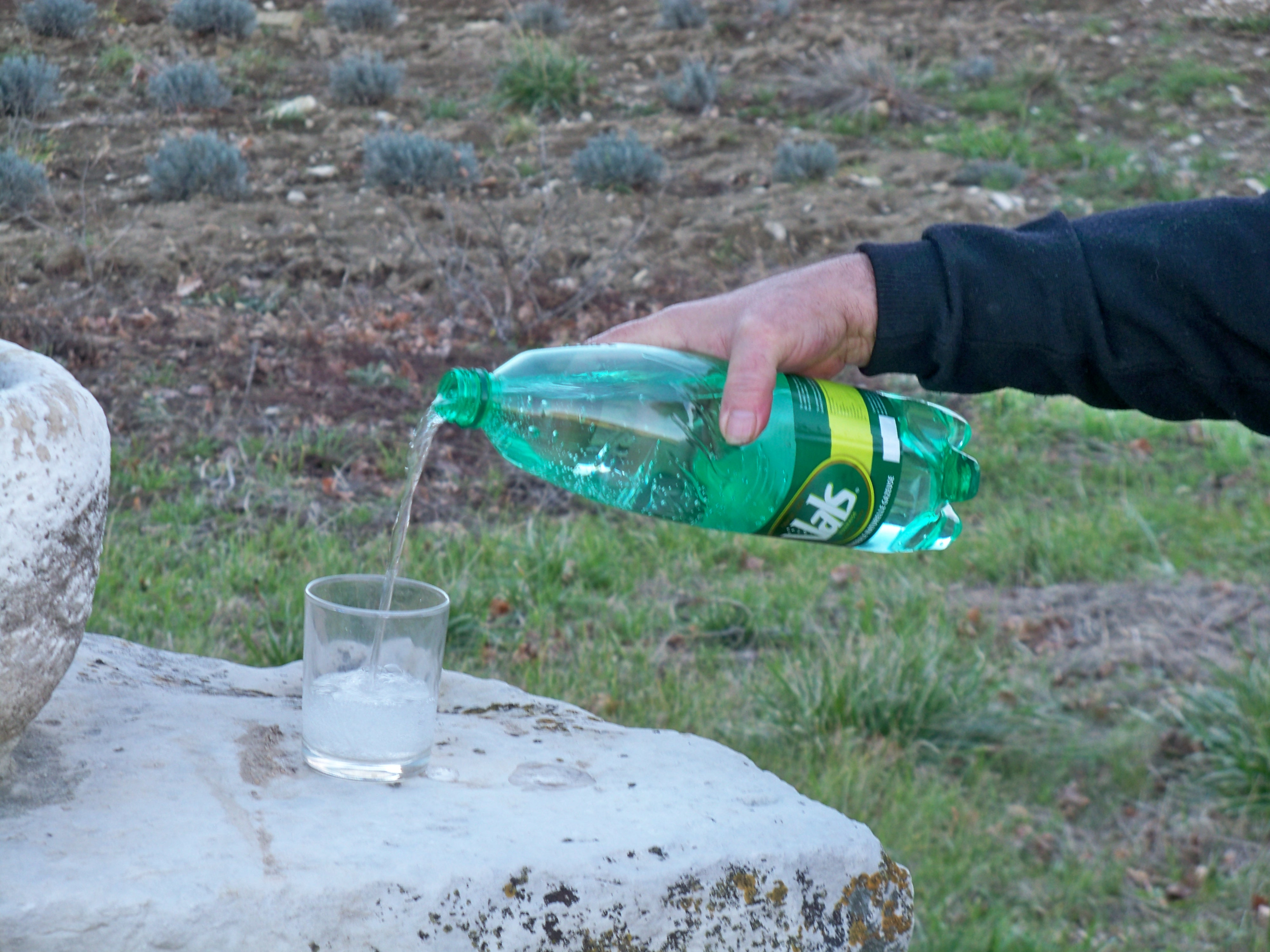 bouteille d'eau de Vals